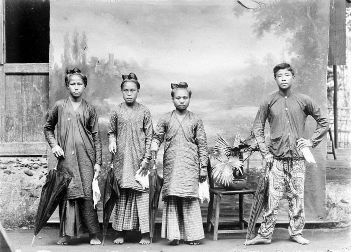 Repronegatief. Bewoners van het eiland Siaoe poseren voor een decor in een fotostudio